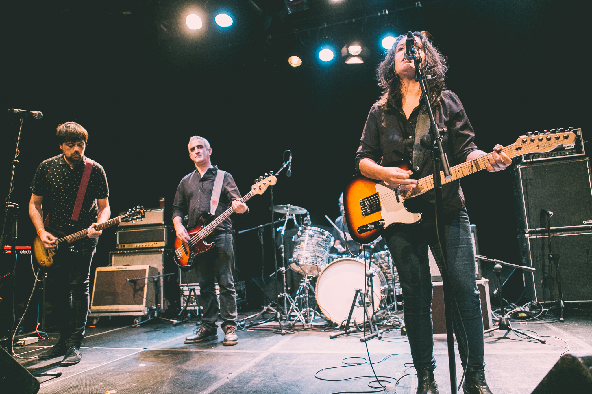 Anari Dkluba kontzertua Intxaurrondo K.E.an. Argazkiak/fotos: Lorena Otero 2017/12/16